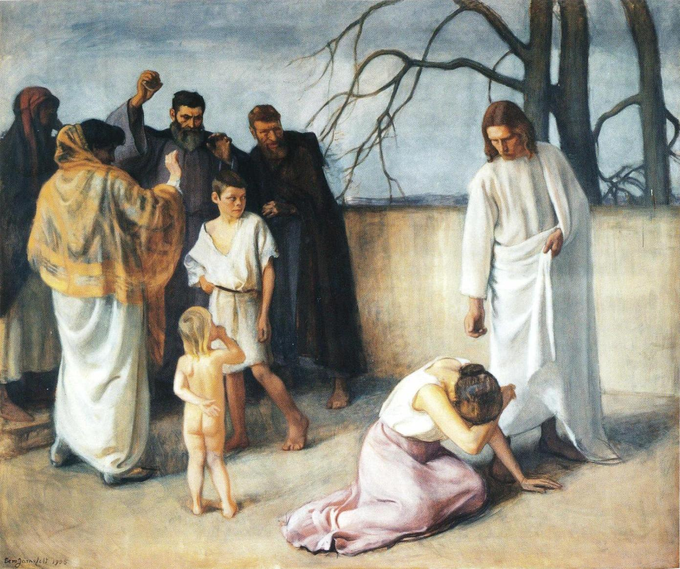 Jeesus ja aviorikoksesta tavattu nainen (myös Jeesus ja langennut nainen), Eero Järnefeltin maalama Liedon kirkon alttaritaulu.